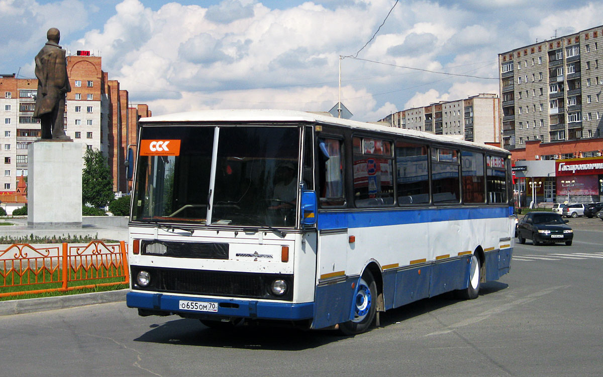 Кароса С734 в Стрежевом